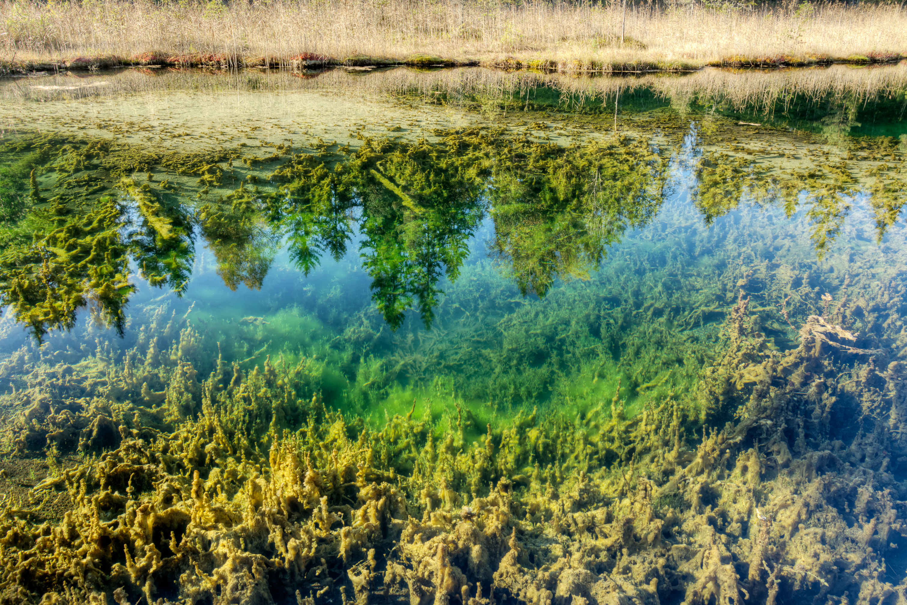 Aegviidu siniallikas